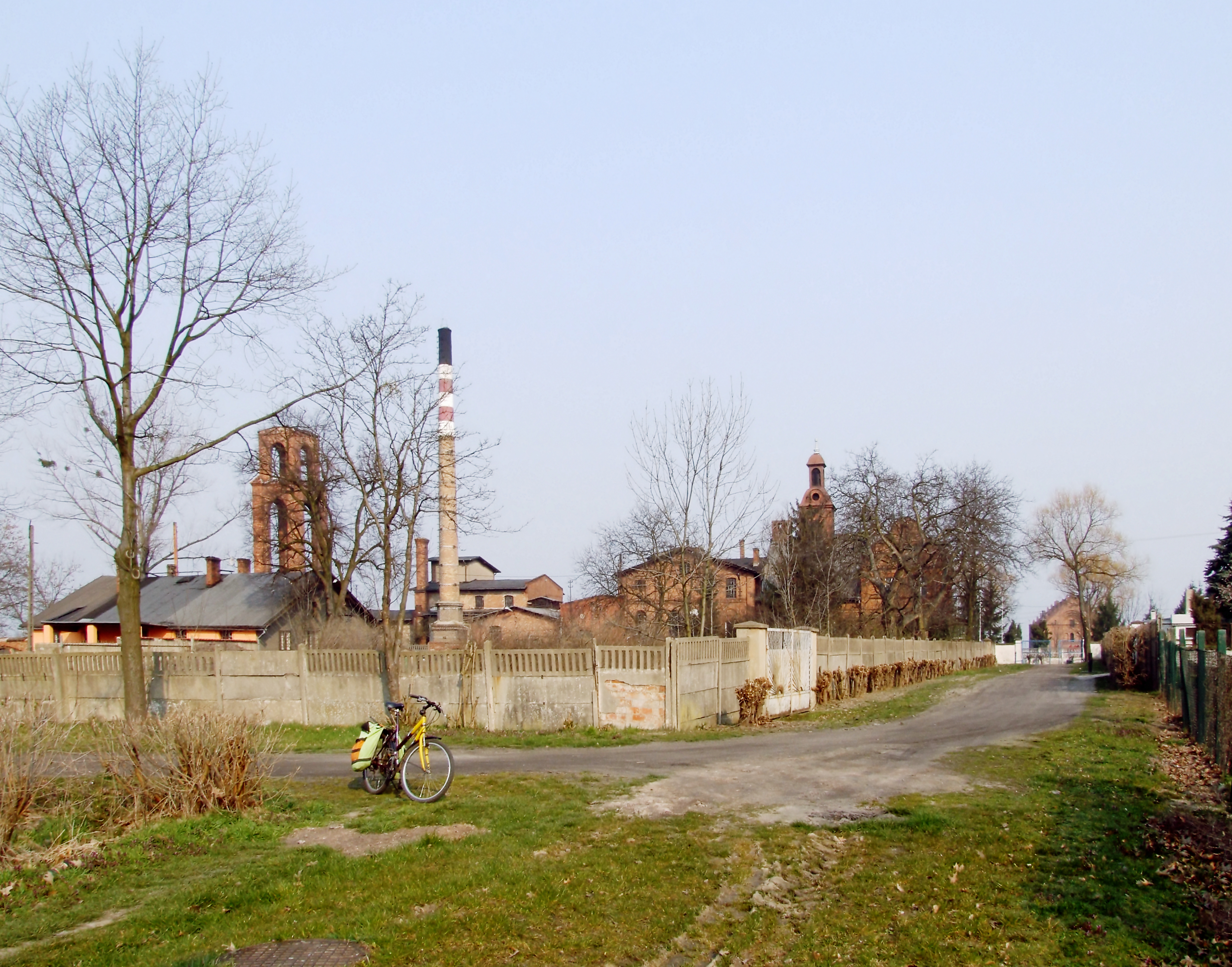 Objezierze, folwark z przełomu XIX/XX w.